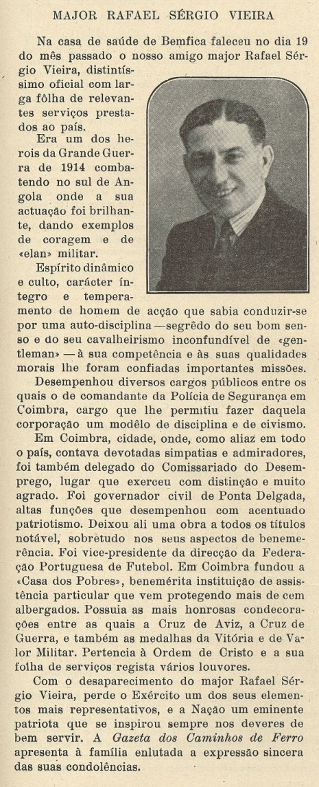 obituário